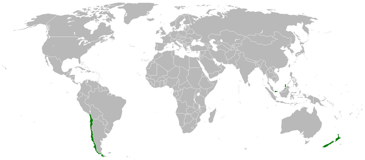 TPSEPの現加盟国4ヶ国の地図